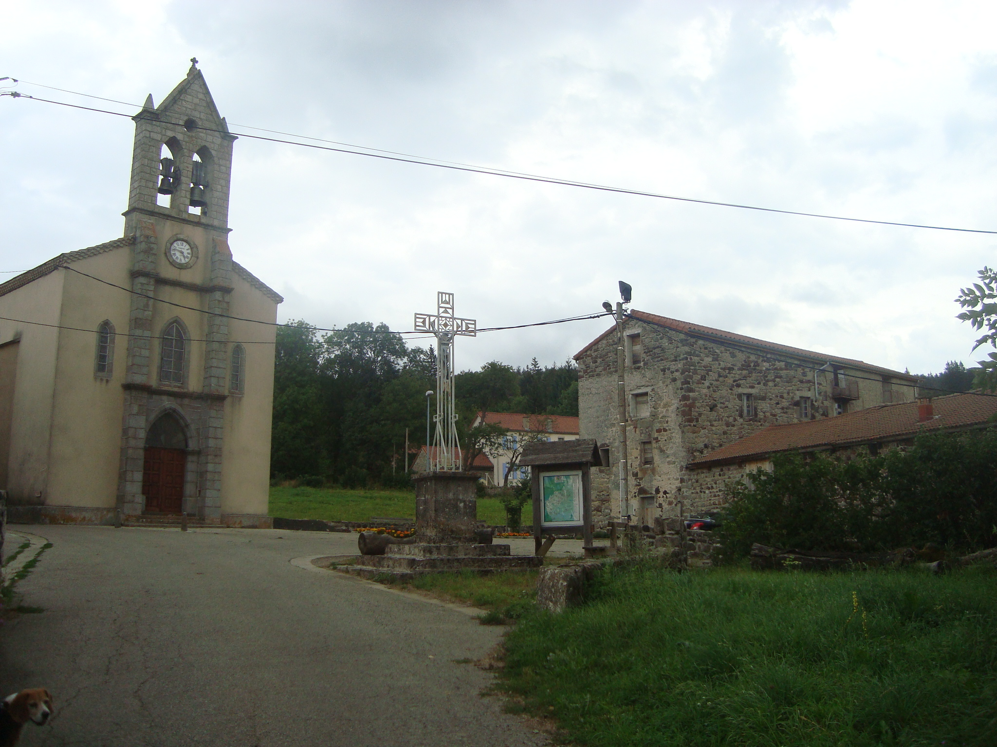 Place du village